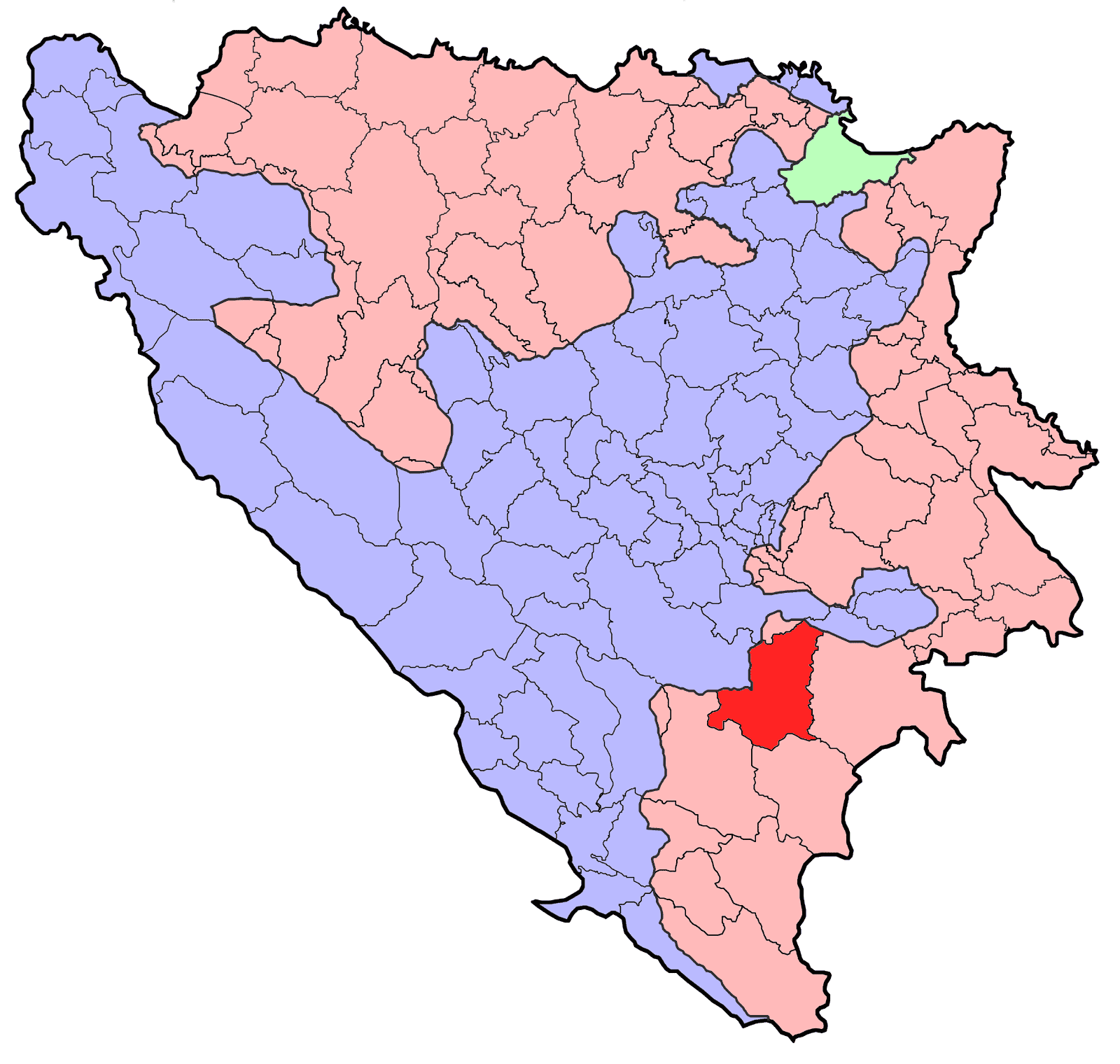 Republika Srpska (BiH) municipality